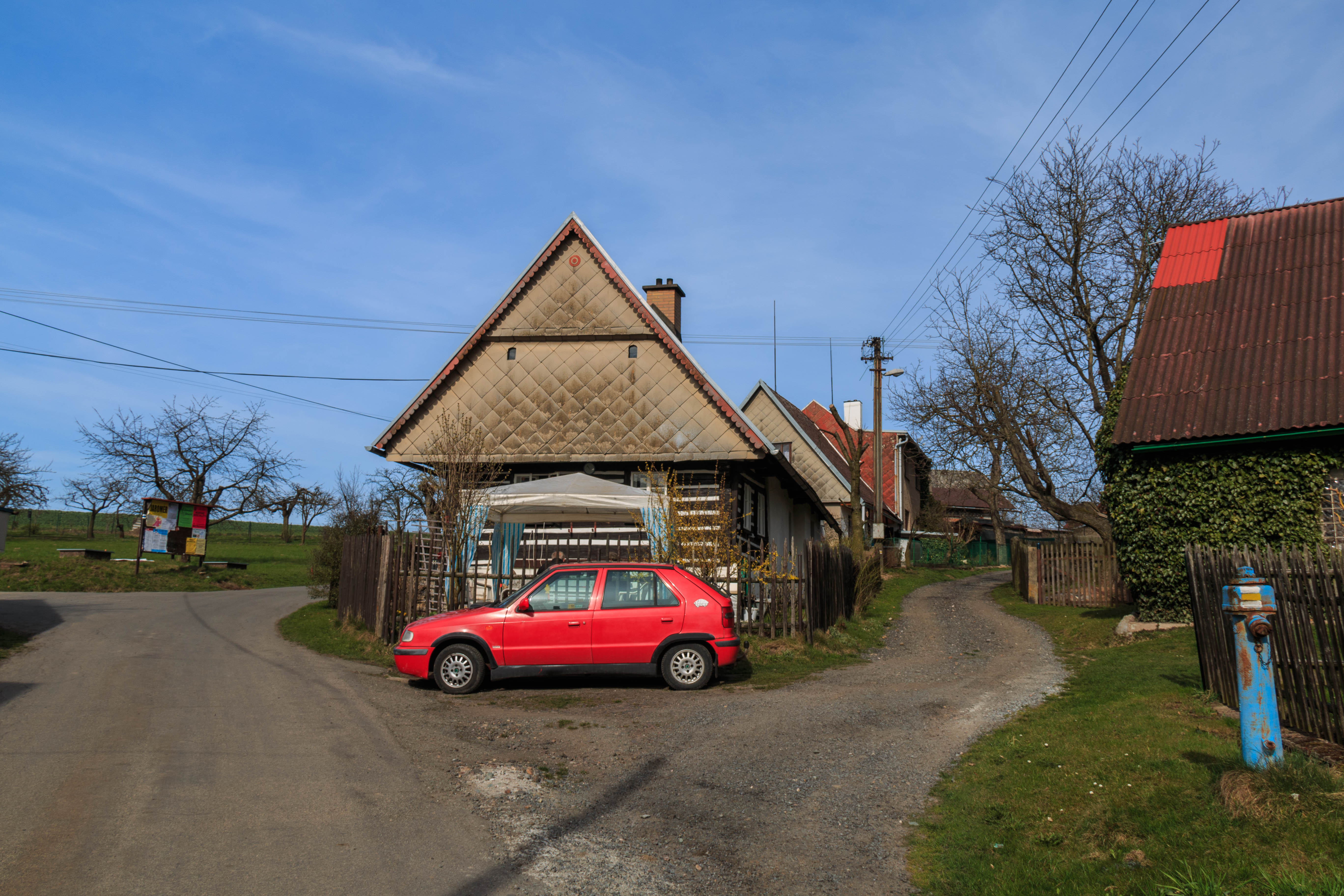 Mstětín čp. 13